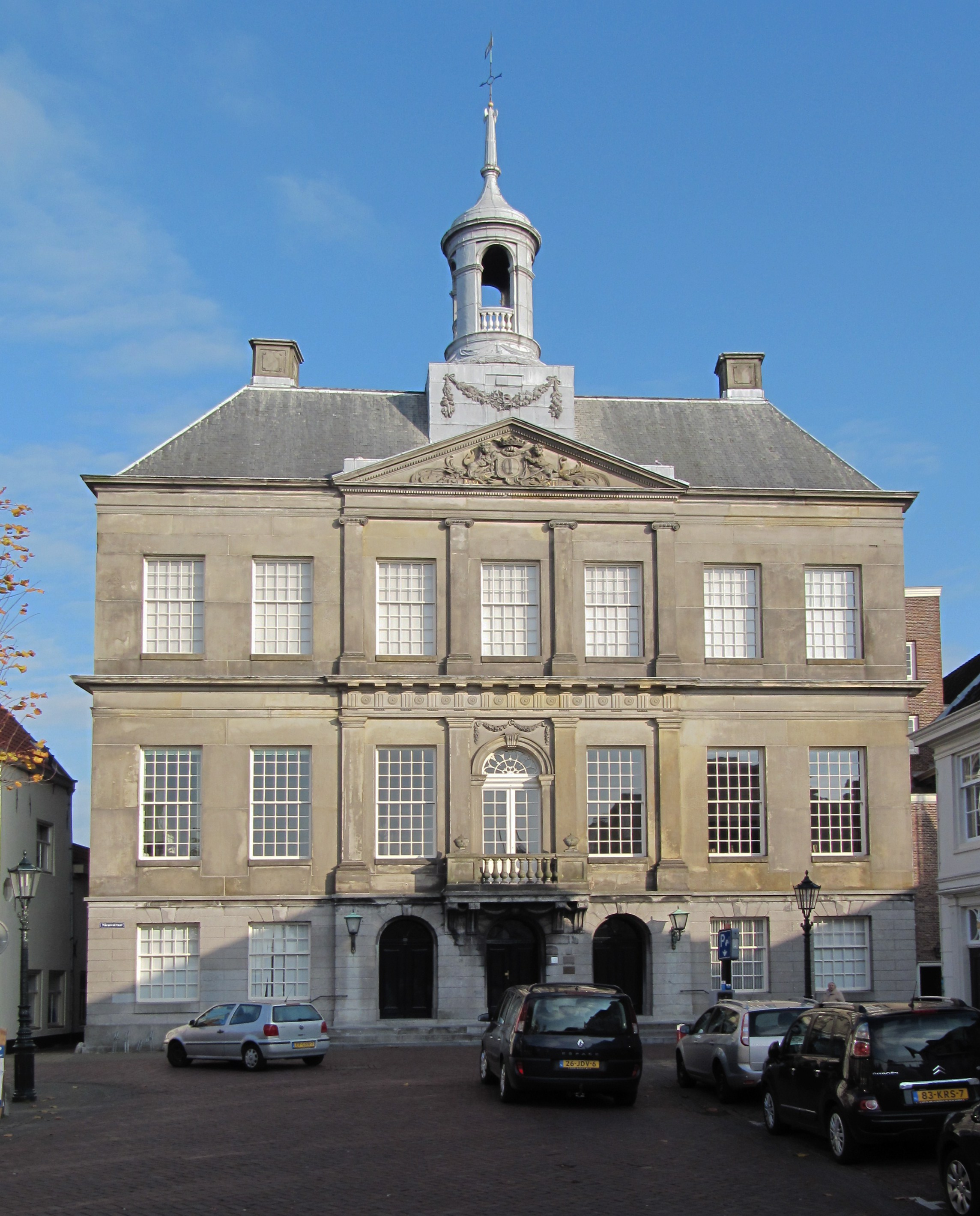 RM38608 Weesp - Nieuwstraat 41 (foto 1).jpg